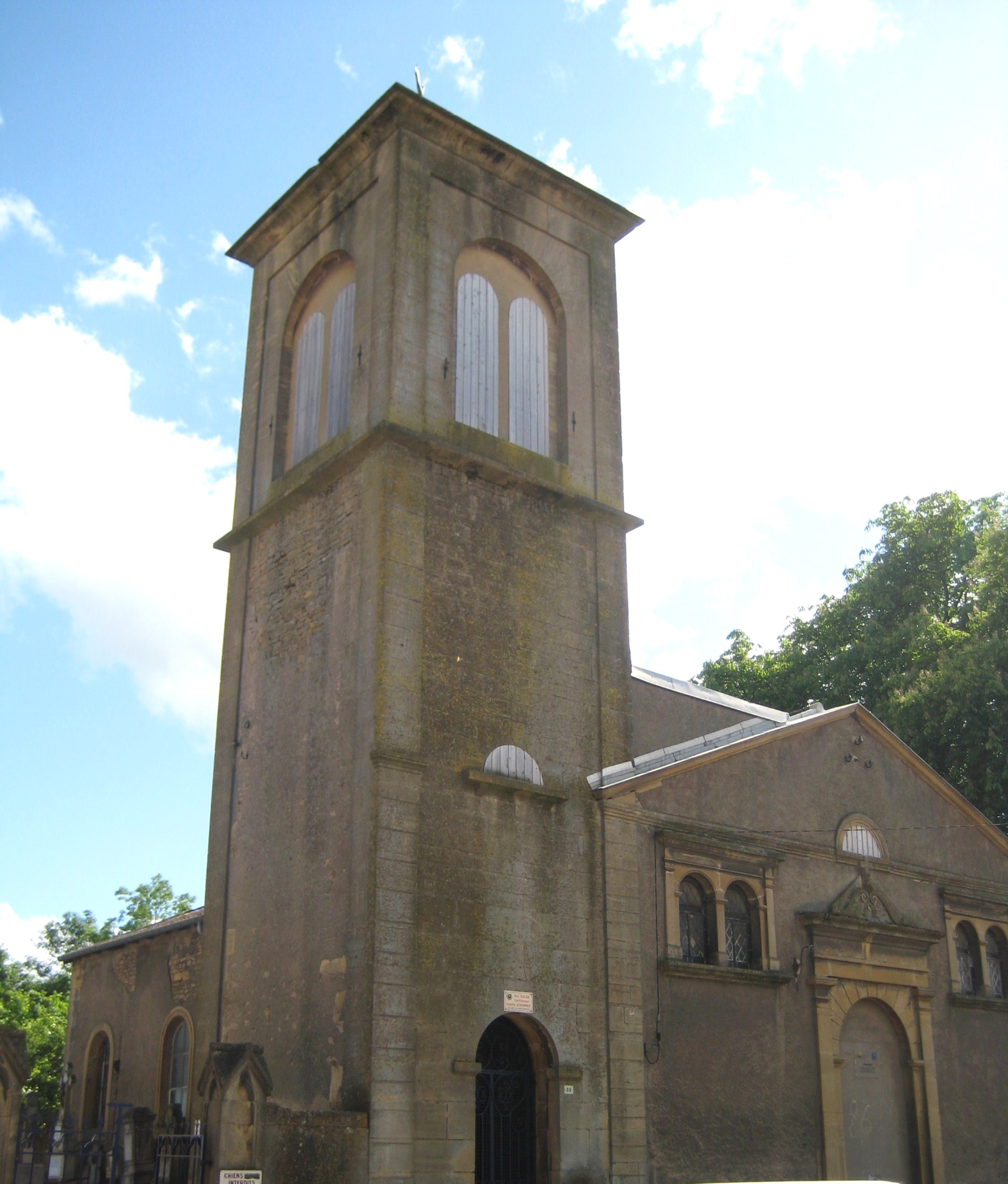 Description Église désaffectée de Montois la Montagne Date19 May 2009Sourcemon appareil photoAuthorAimelaime Église désaffectée de Montois la Montagne